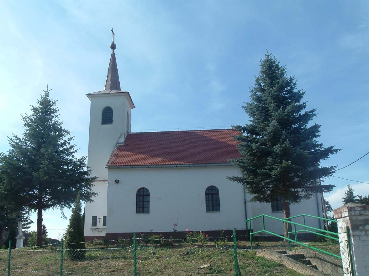 The Roman Catholic Church in Hegyhátszentpéter. Szent Péter és Pál római katolikus templom